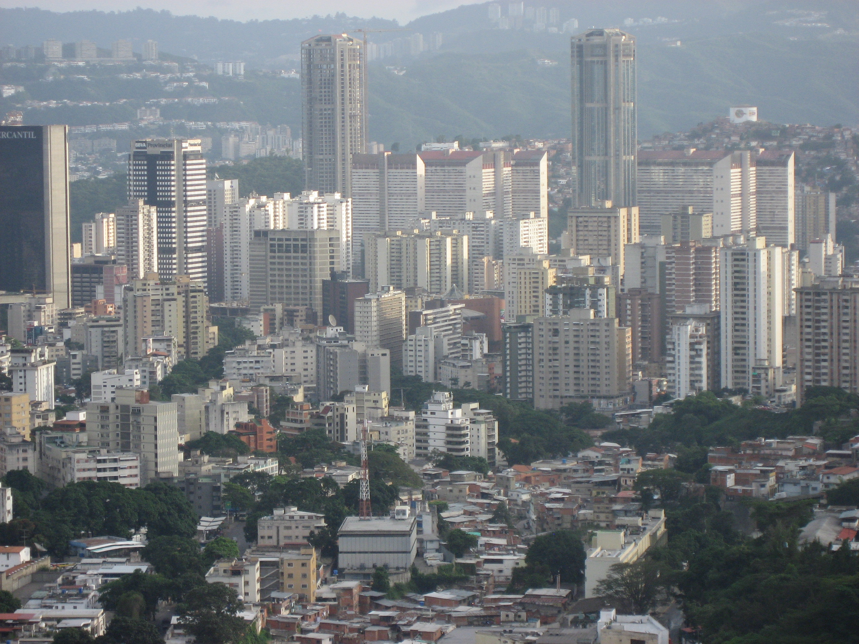 Caracas_dec.jpg